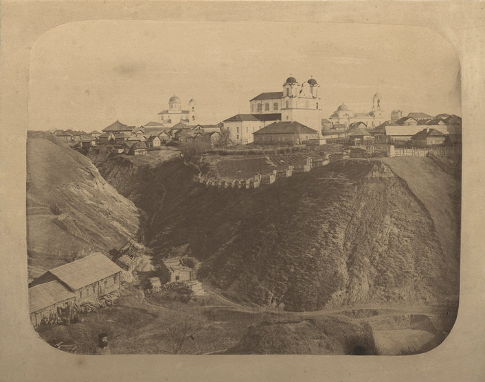 Беларуская (тарашкевіца): Амсьціслаў (Amścisłaŭ), Траецкая гара (Trajeckaja hara). Панарама места